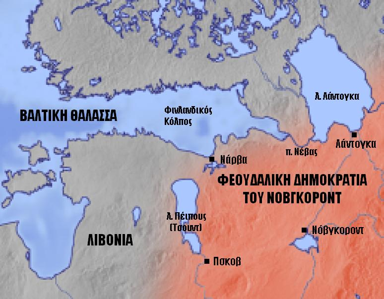 Η Φεουδαλική Δημοκρατία του Νόβγκοροντ στα μέσα του 13ου αι.